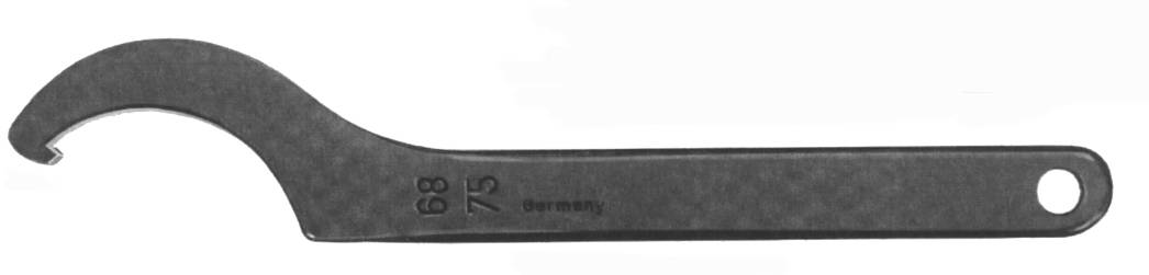 Clé à ergot.